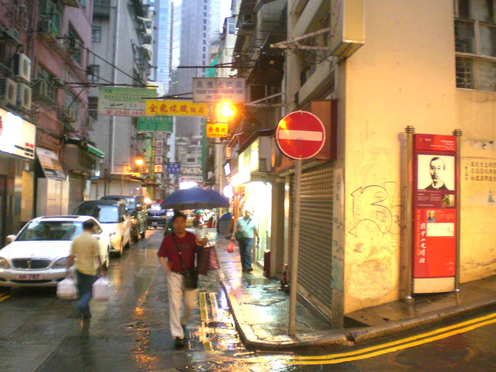 孫中山史蹟徑第七站, 楊耀記, 中環鴨巴甸街 & 結志街